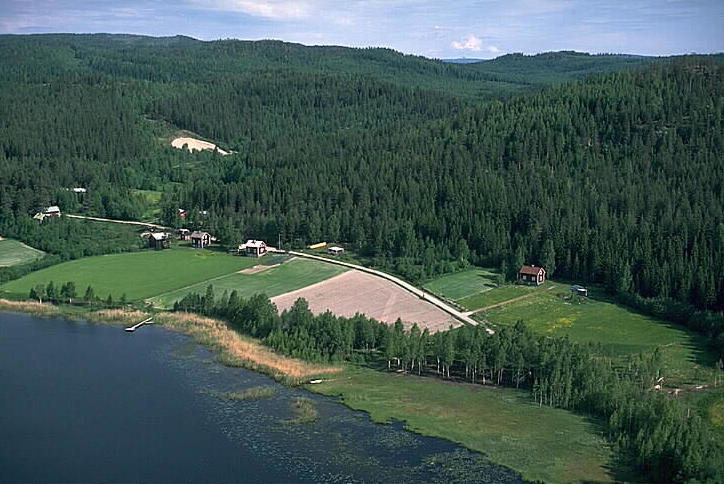 Ett så kallat "Per-Albintorp". Motiv: Pannsjön Nyckelord: Flygbilder, Riksintressen Kategori: Torp Ett så kallat "Per-Albintorp".